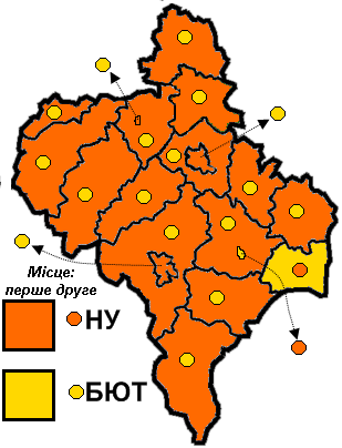 Результати виборів до Івано-Франківської обласної ради 2006 року за районами